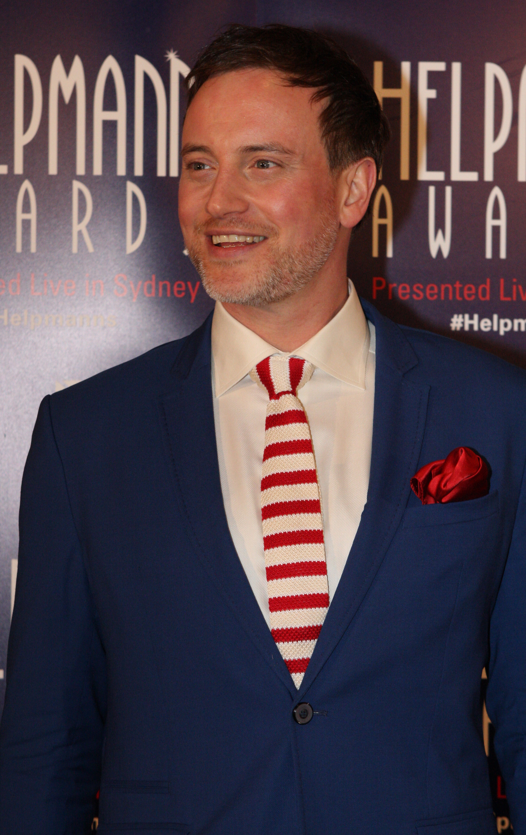 Hayden Tee